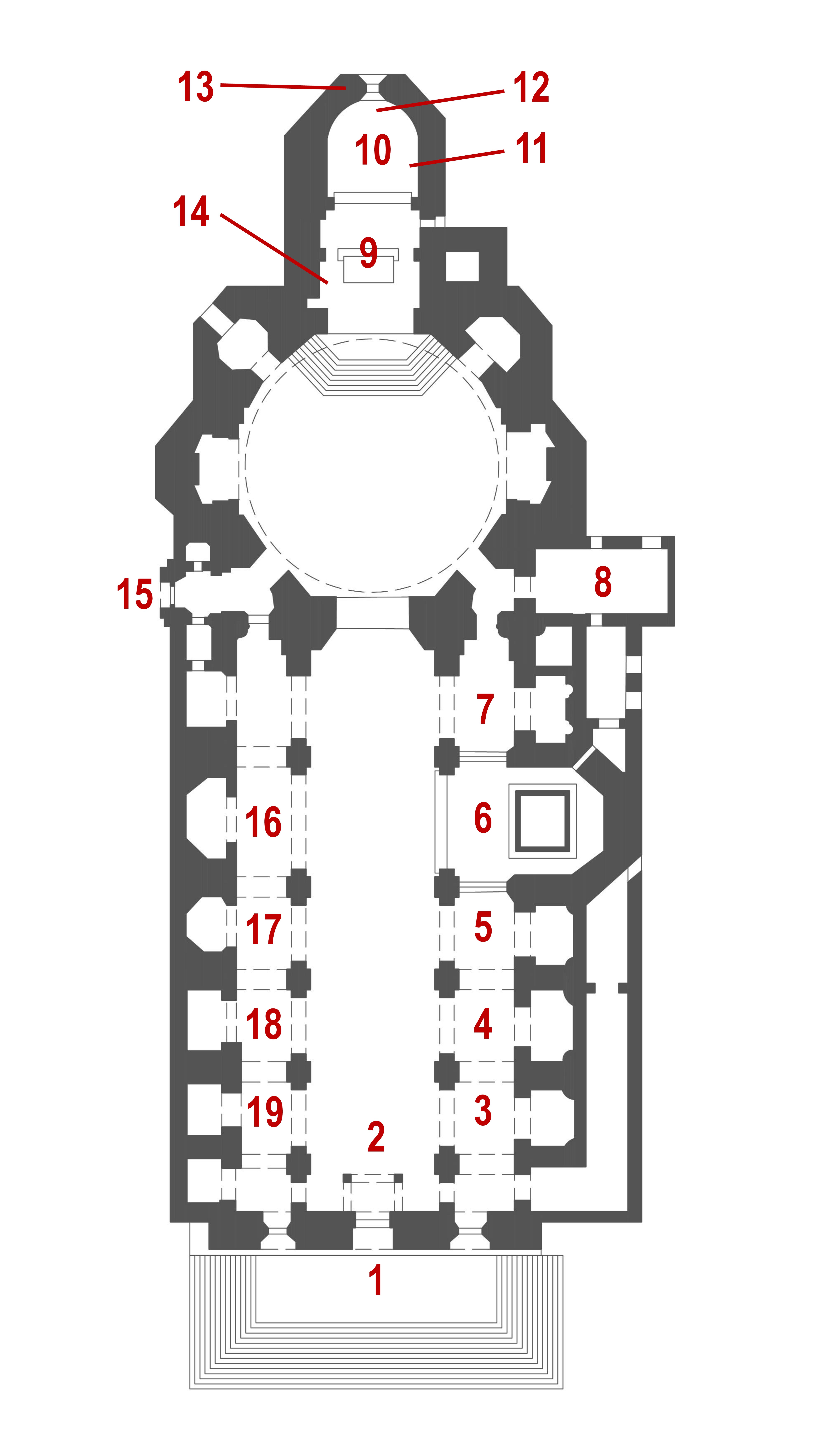 Mappa della basilica di San Bernardino con indicazione numerata dei principali monumenti